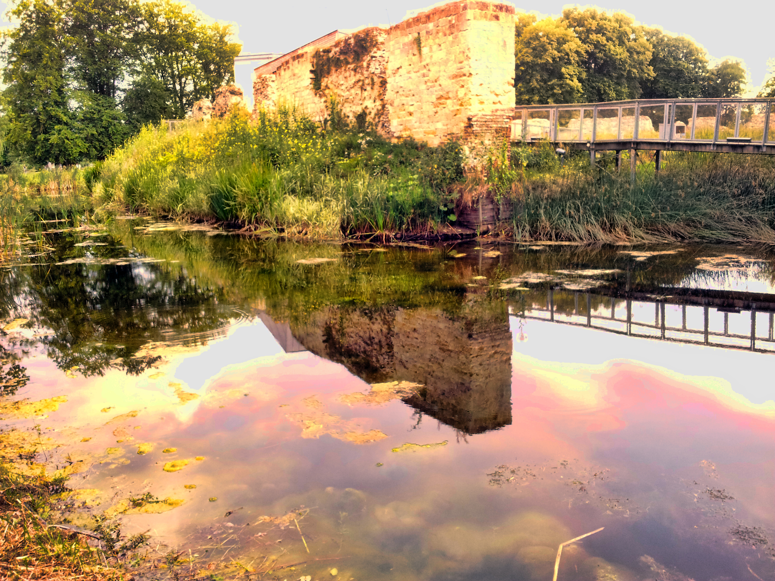 Waterburcht Ruïne Pietersheim